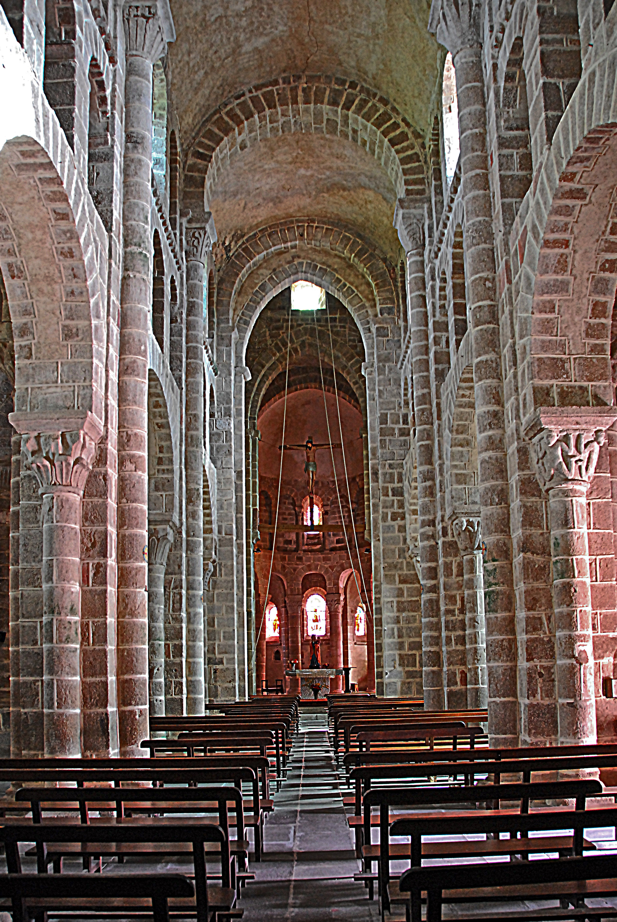 N.-D. de Châtel-Montagne, Mittelschiff aus Joch 1